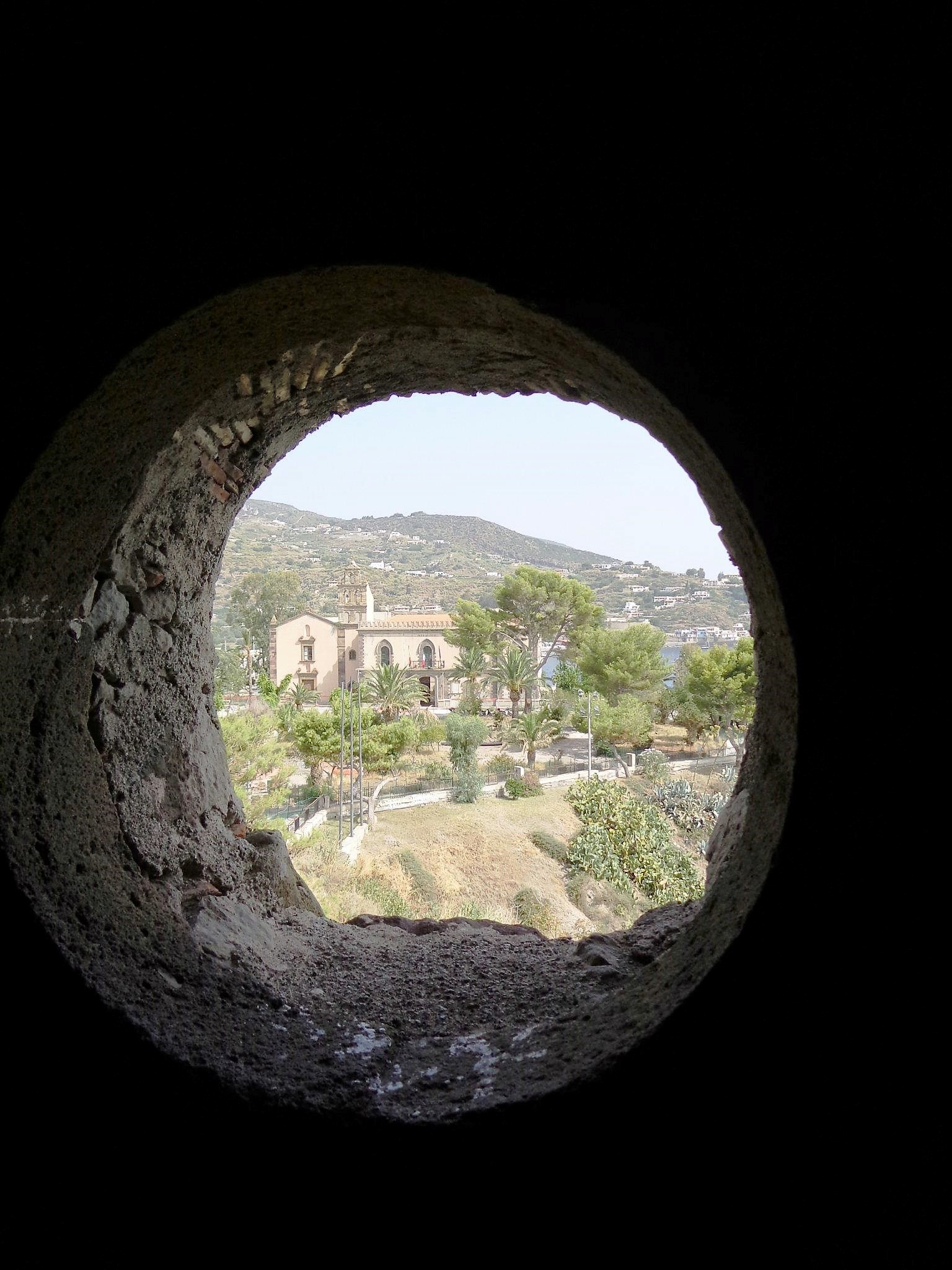 Finestra della galleria e veduta sottocastello